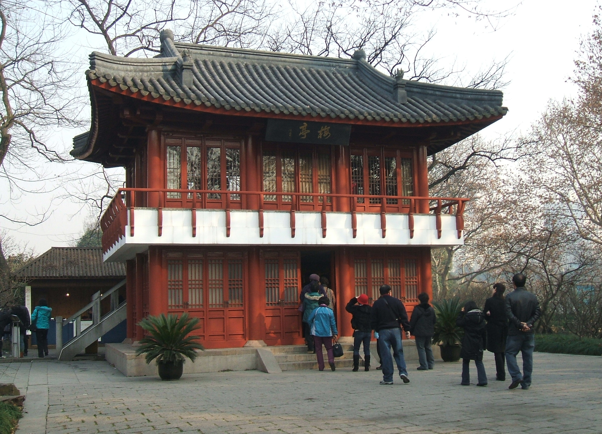 中華人民共和国上海市の魯迅公園にある尹奉吉を記念する「梅亭」